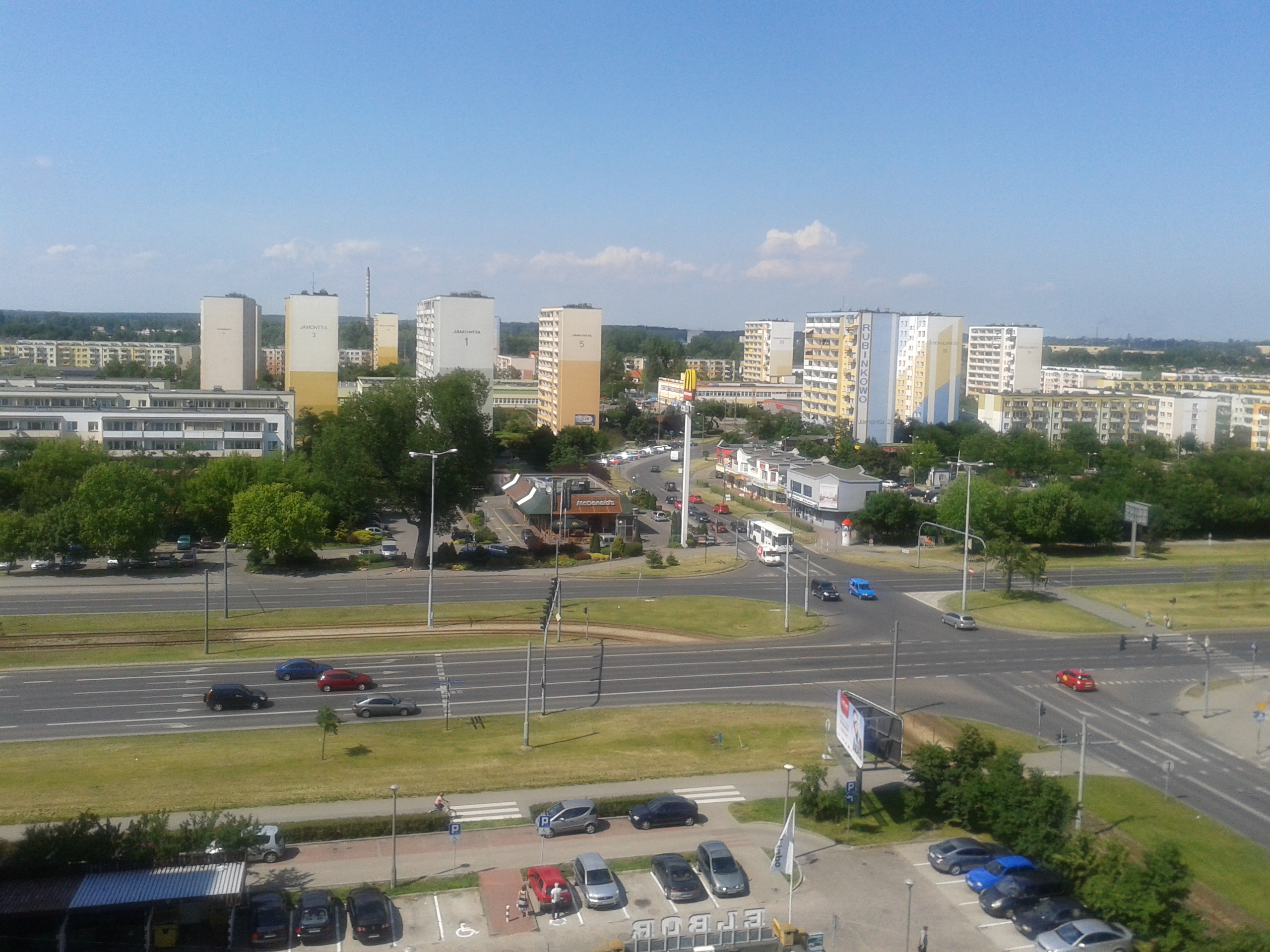 Widok na osiedle Rubinkowo 2 w Toruniu - zdjęcie zrobione na najwyższym piętrze z okna klatki schodowej wieżowca Ślaskiego 6